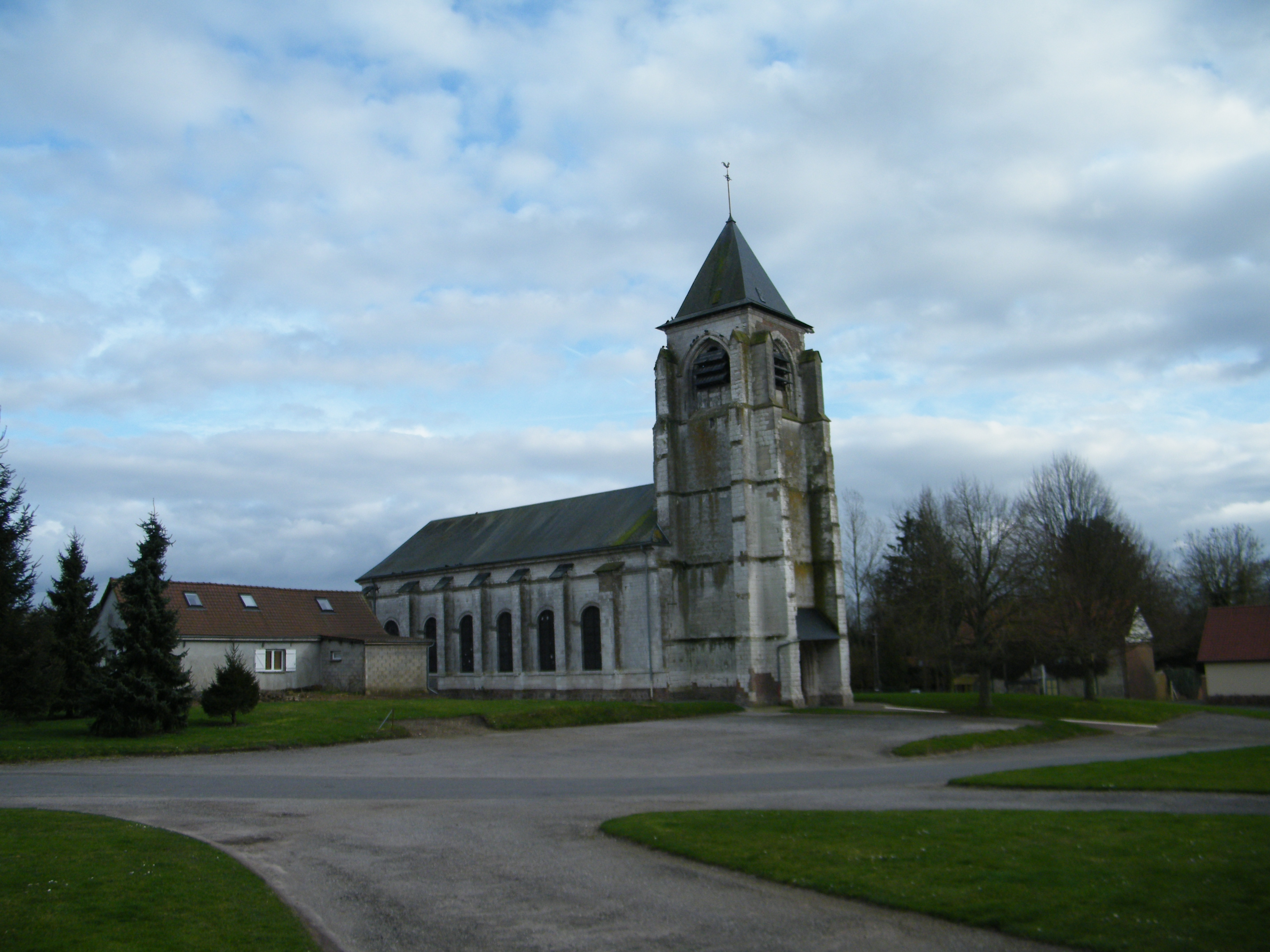 église